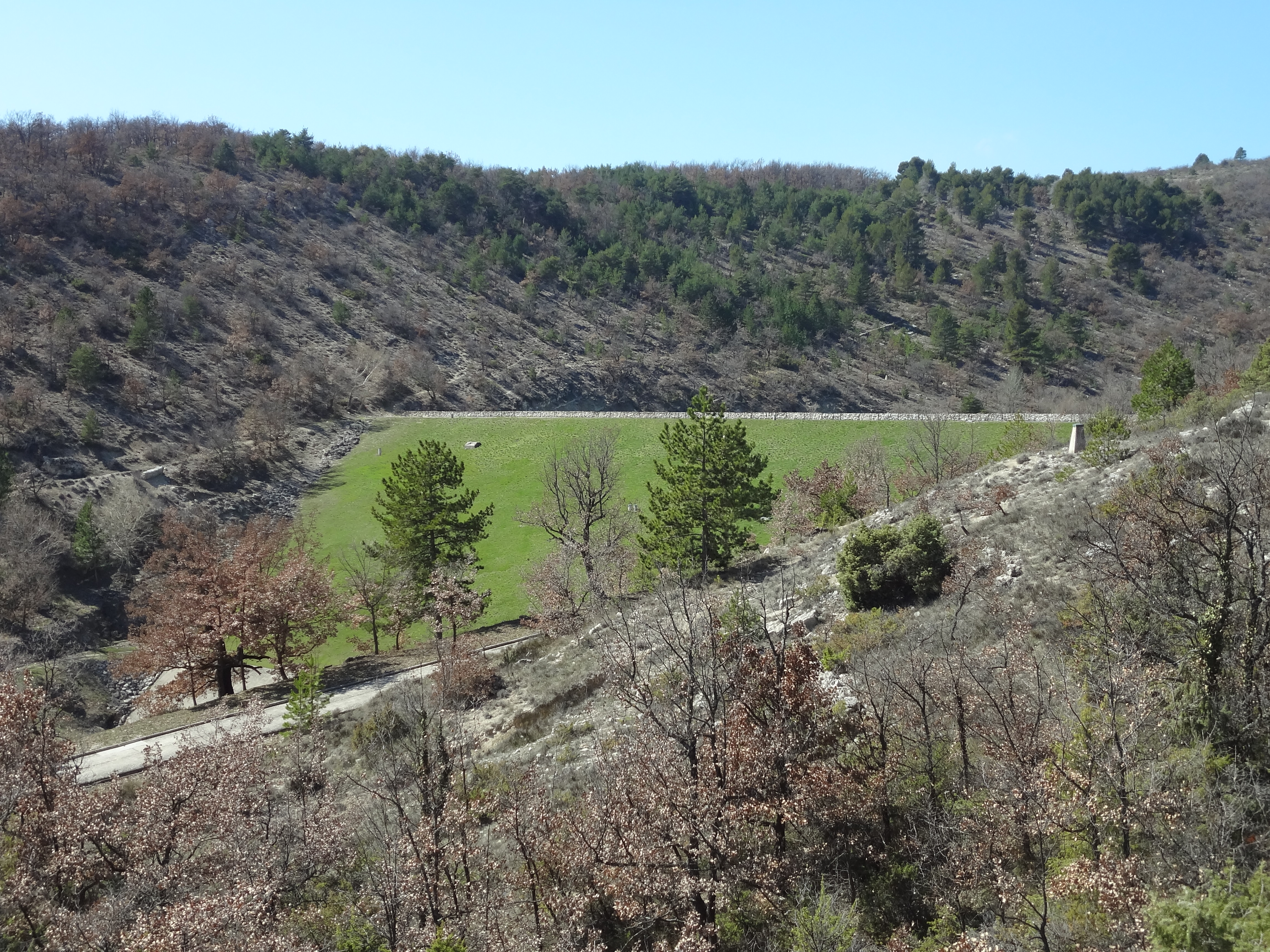 Barrage en terre de la Laye